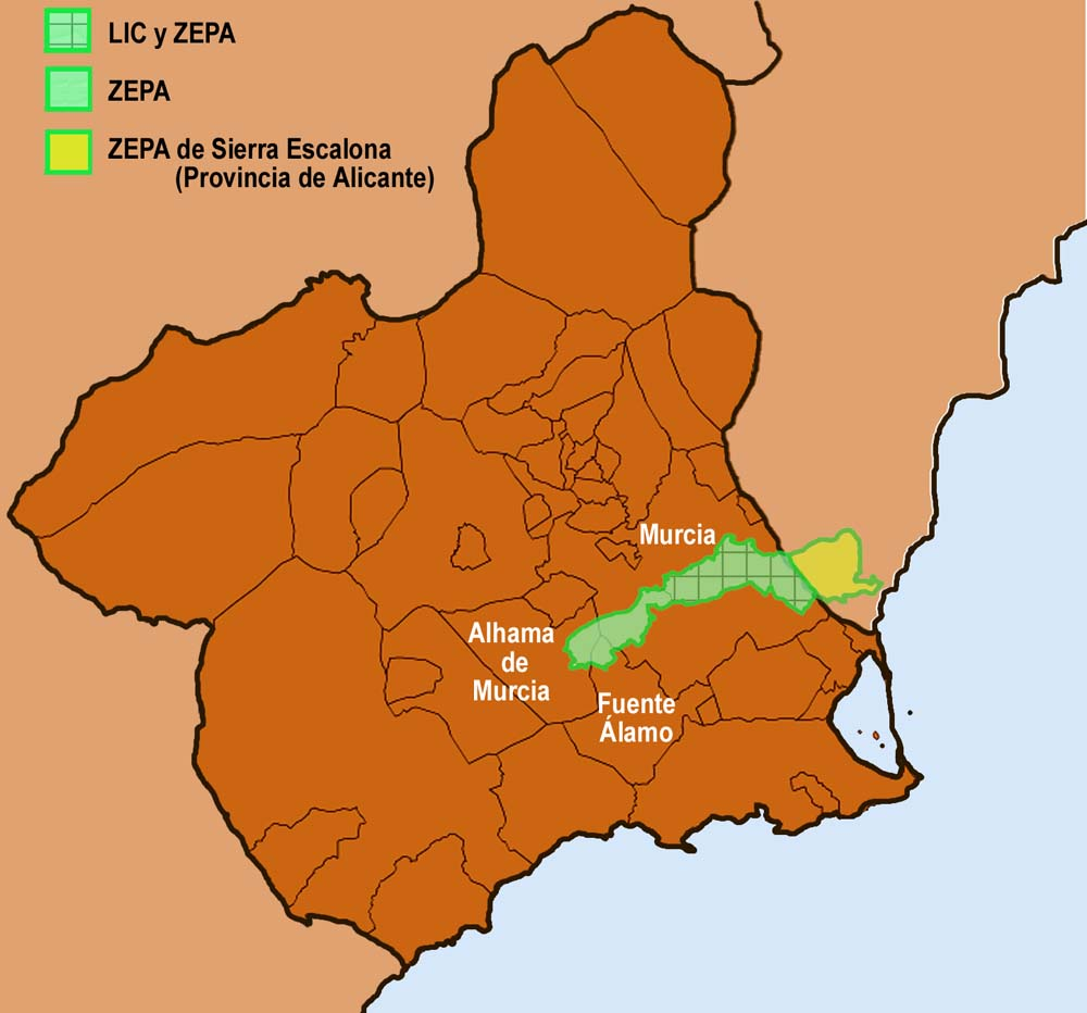 Situación de los LIC y ZEPA de Carrascoy, El Valle y Sierra Escalona.